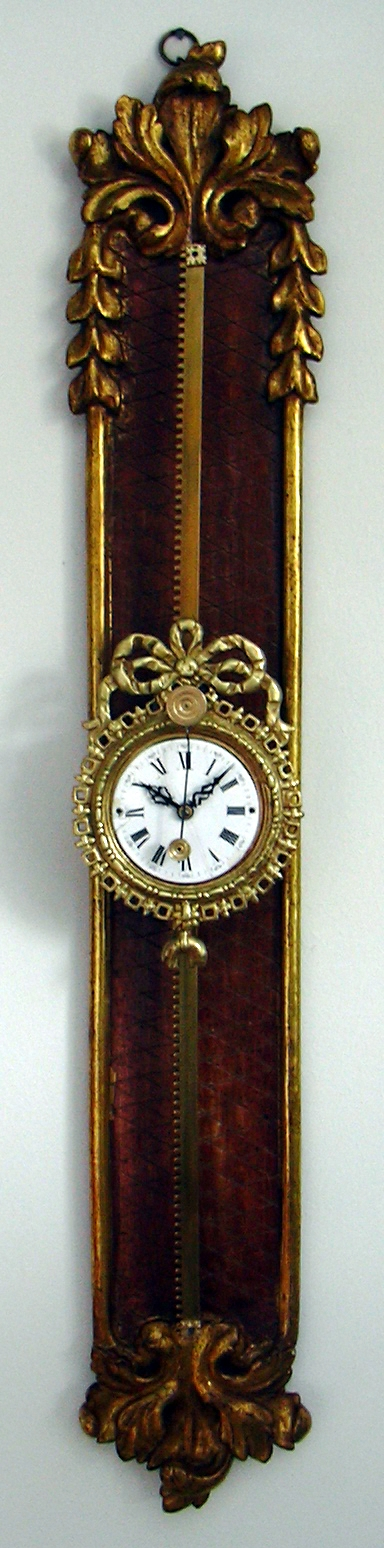 Sägeuhr